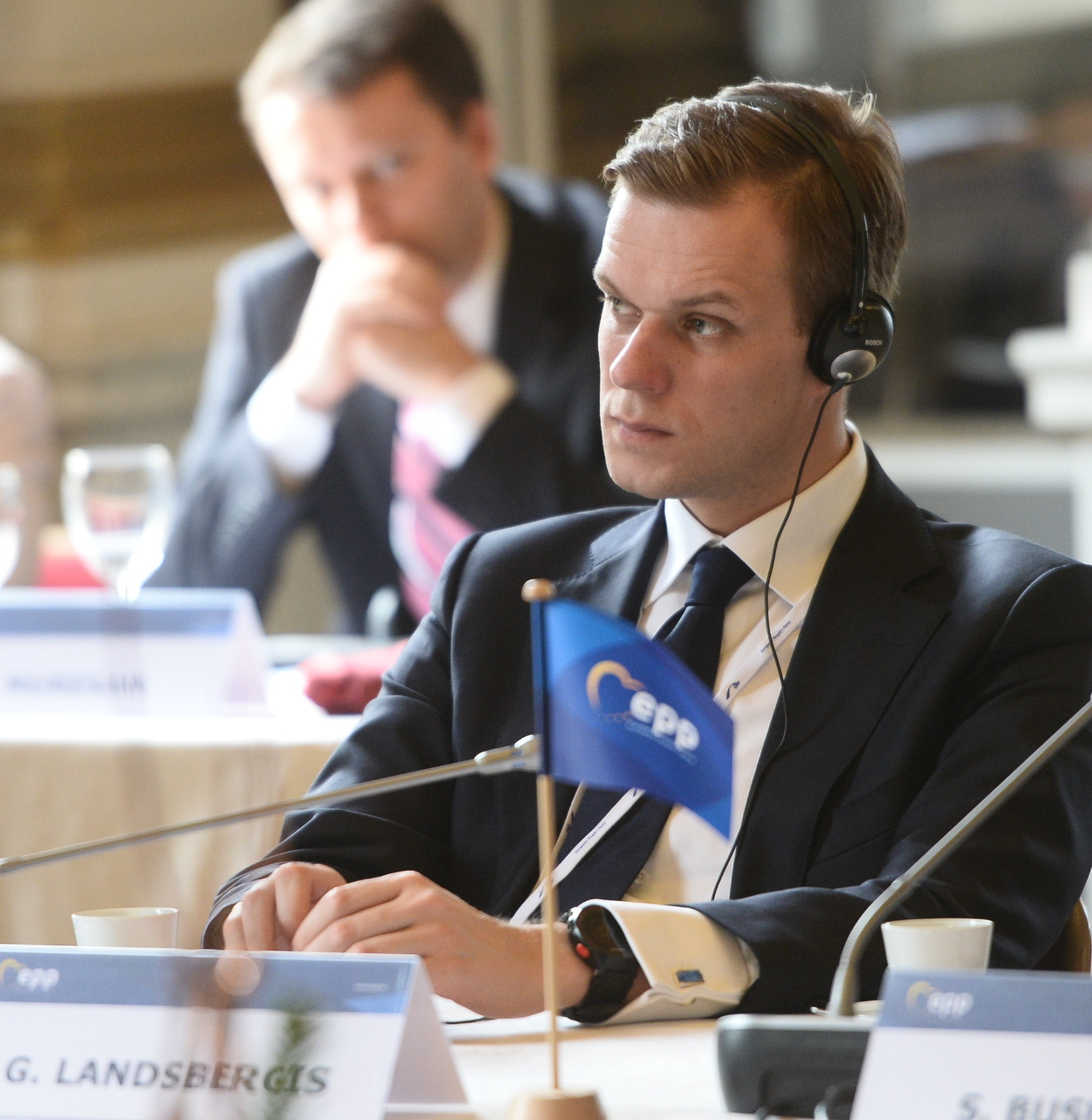 EPP Summit, December 2015